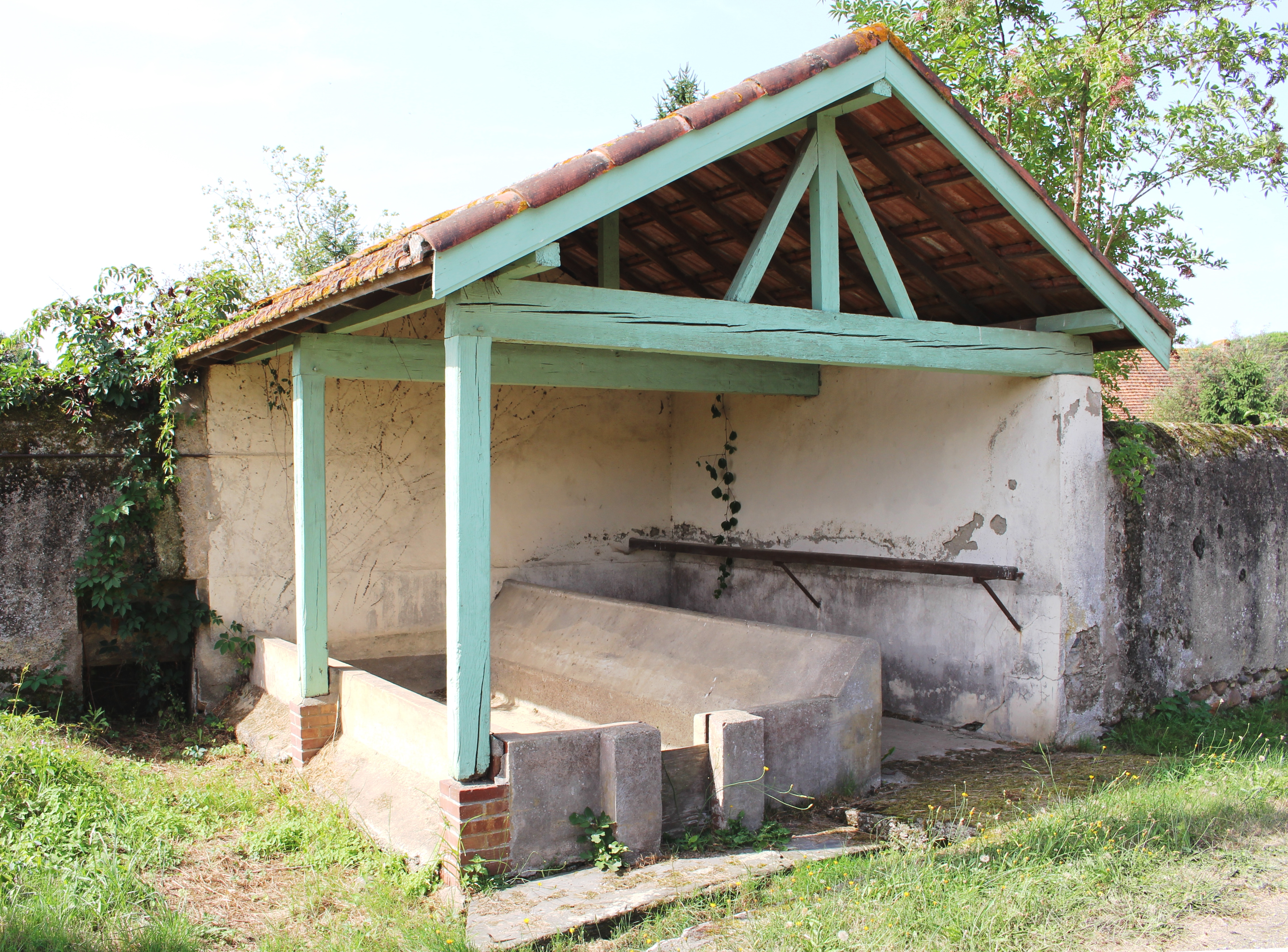 Lavoir de Talazac (Hautes-Pyrénées)